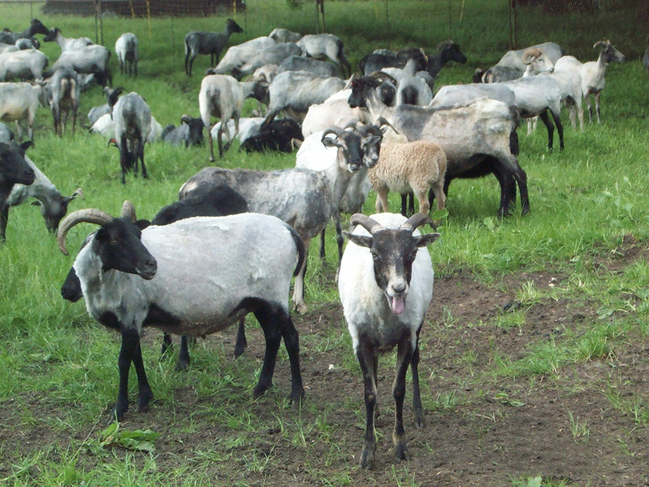 gerade eben geschorene Heidschnucken in der Lüneburger Heide, Mai 2002